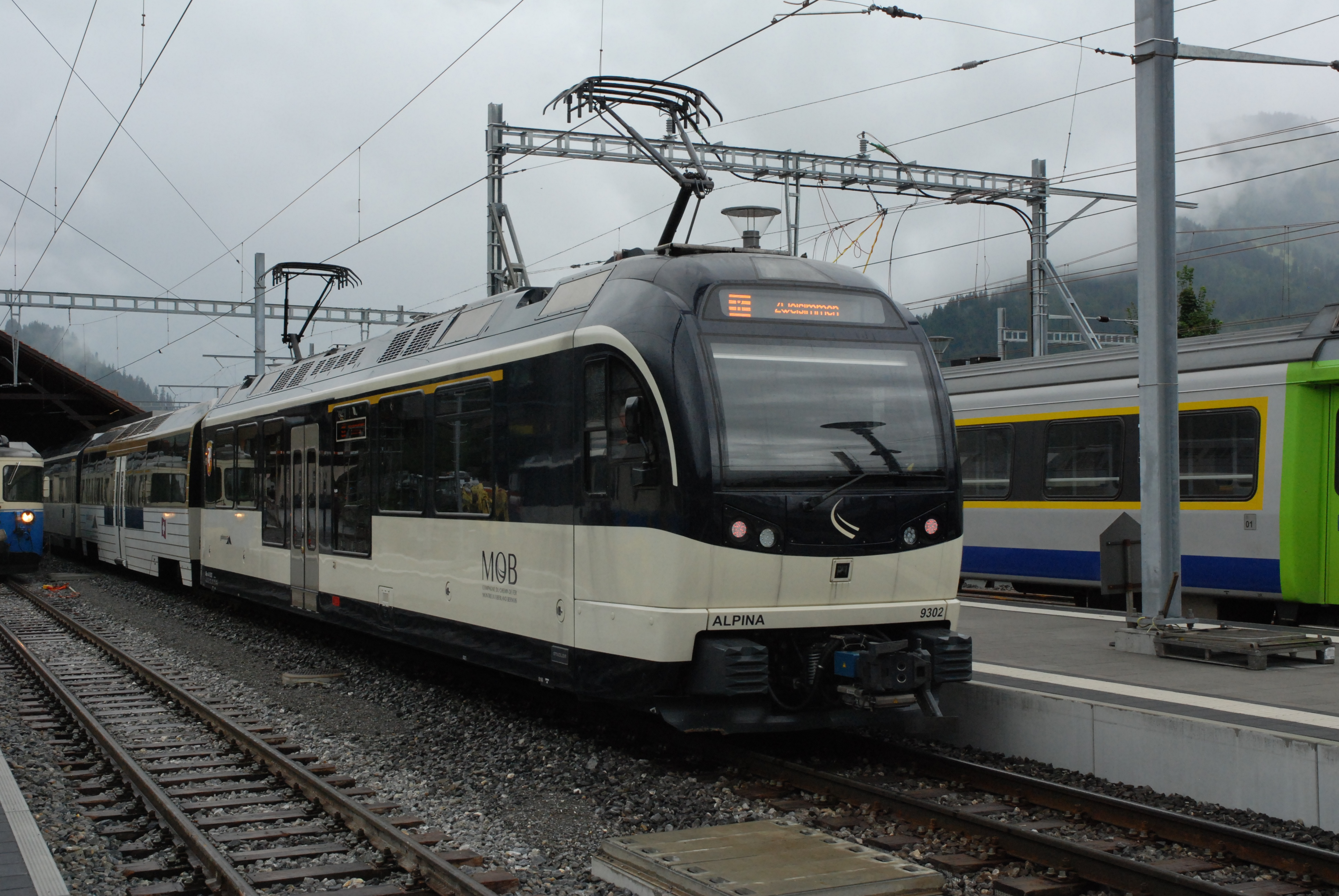 MOB ABe 4/4 9302